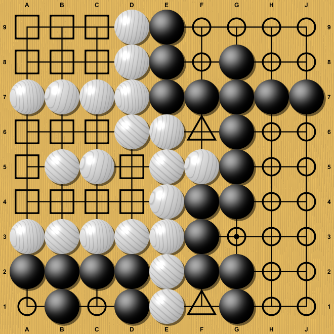 Conteo de territorio en el Go